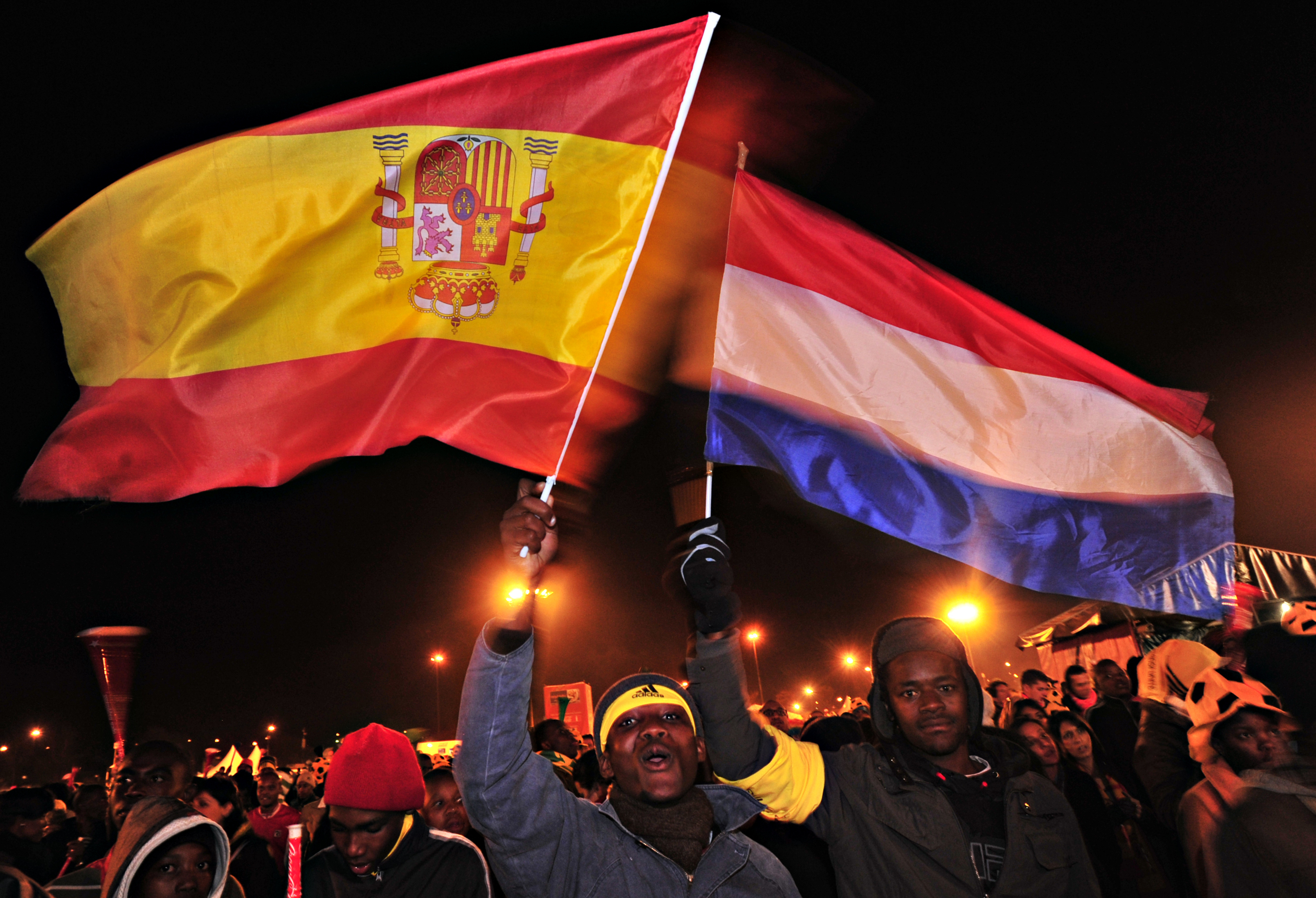 Joanesburgo (África do Sul) - Sul-africanos celebram vitória da Espanha e sucesso da Copa.